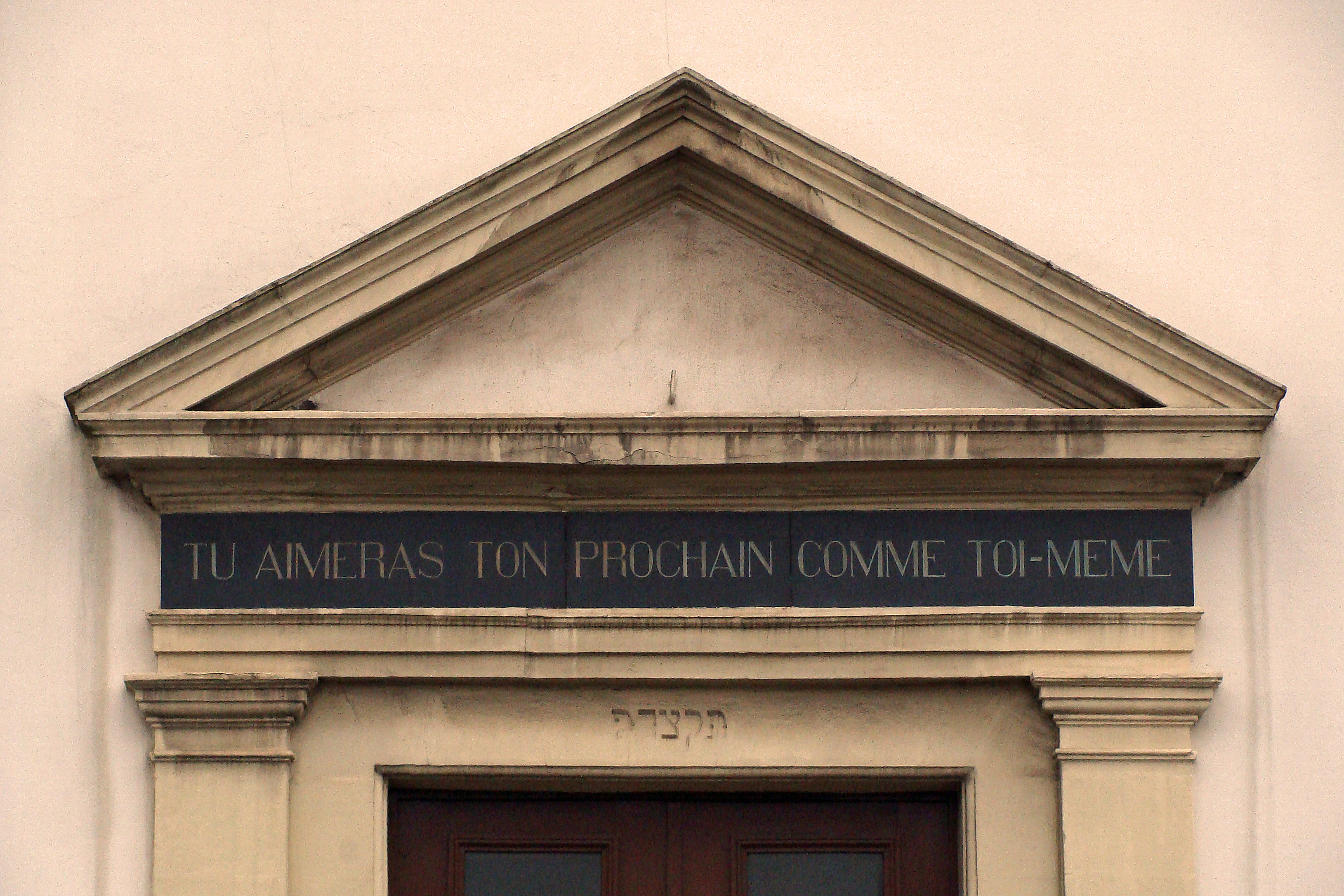 Frontispice de la porte d'entrée de la synagogue de Forbach, avenue Saint-Rémy, construite de 1835 à 1836.